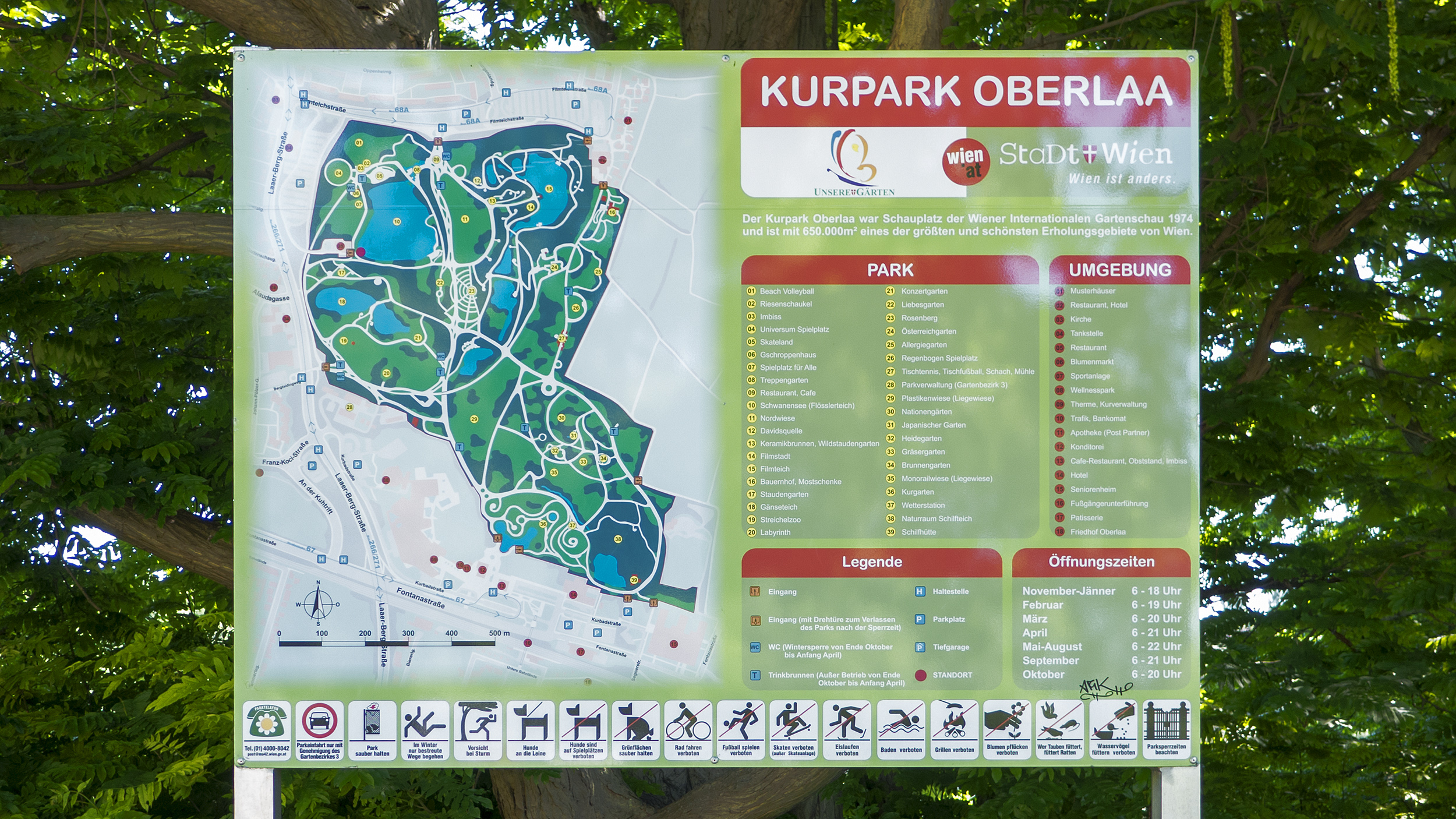 Kurpark Oberlaa in Wien 10, Übersichtstafel